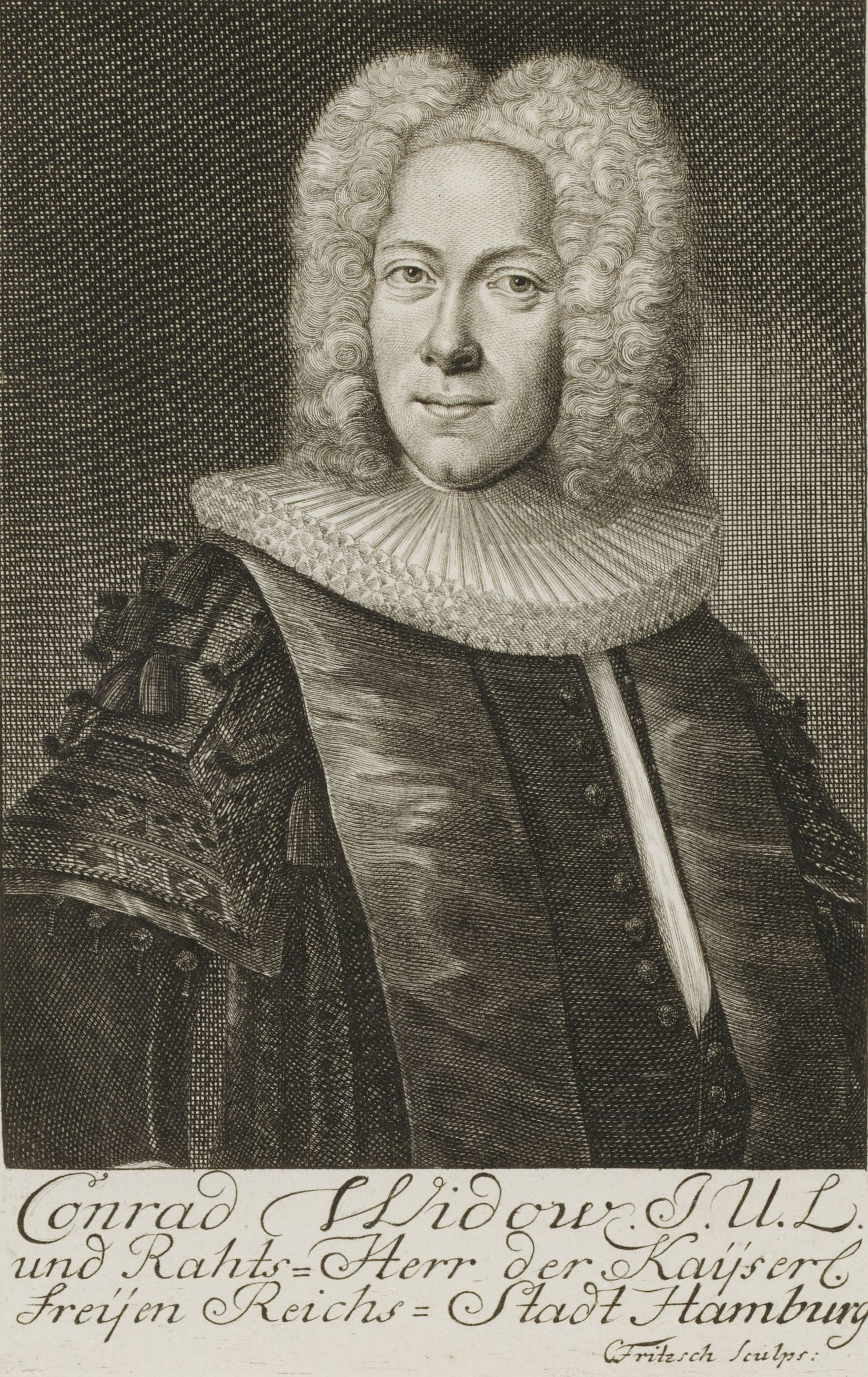 Conrad Widow J. U. L. und Burgermeister der Kayserl. freyen Reichs=Stadt Hamburg